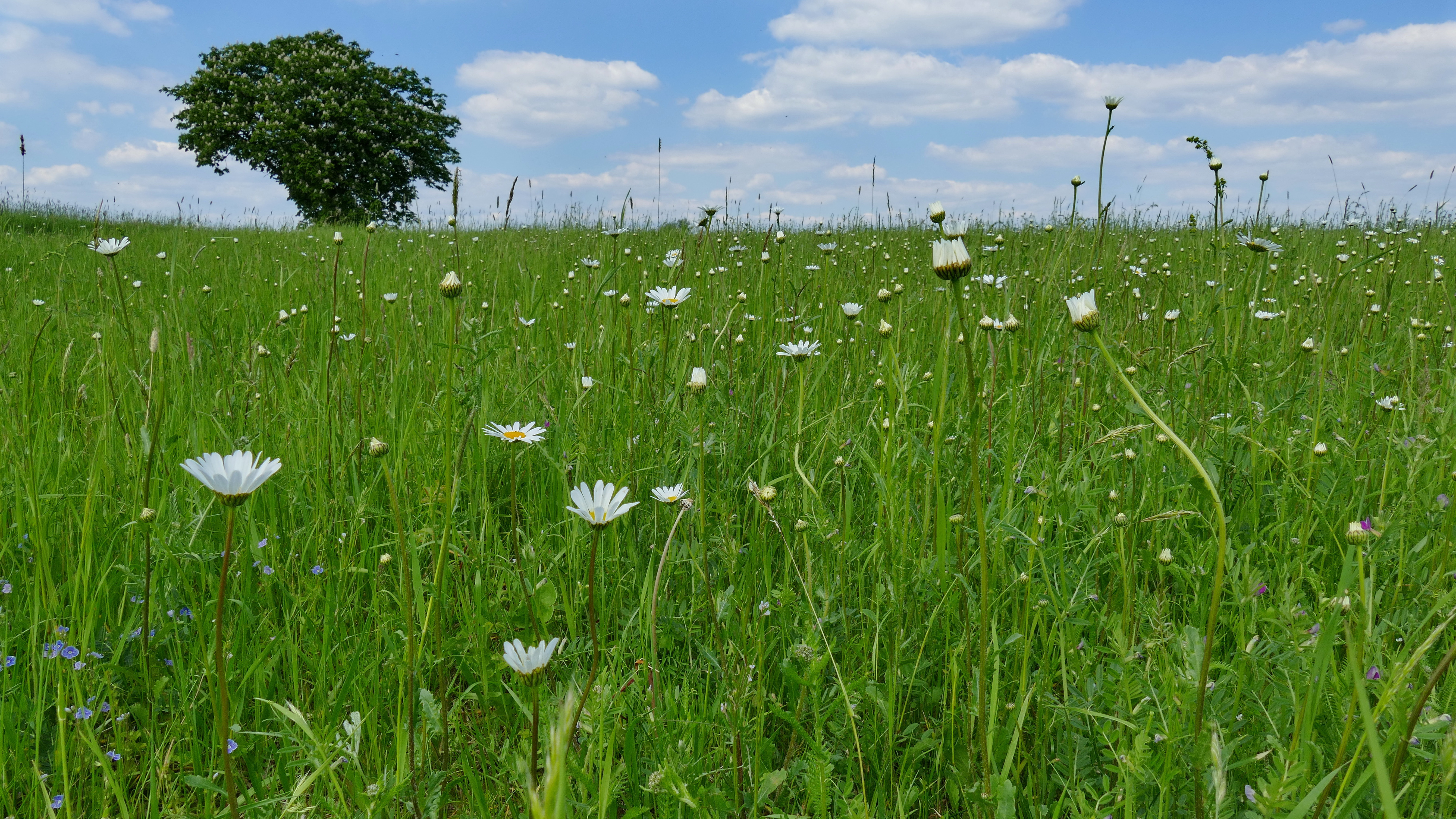 NSG-HA 133 "Hahnenkamp“: Dieses Naturschutzgebiet ist vorwiegend von Feuchtgrünland geprägt, hier ist eine der extensiv genutzten Wiesen zu sehen. Es ist deckungsgleich mit dem FFH-Gebiet Hahnenkamp (3626-301).